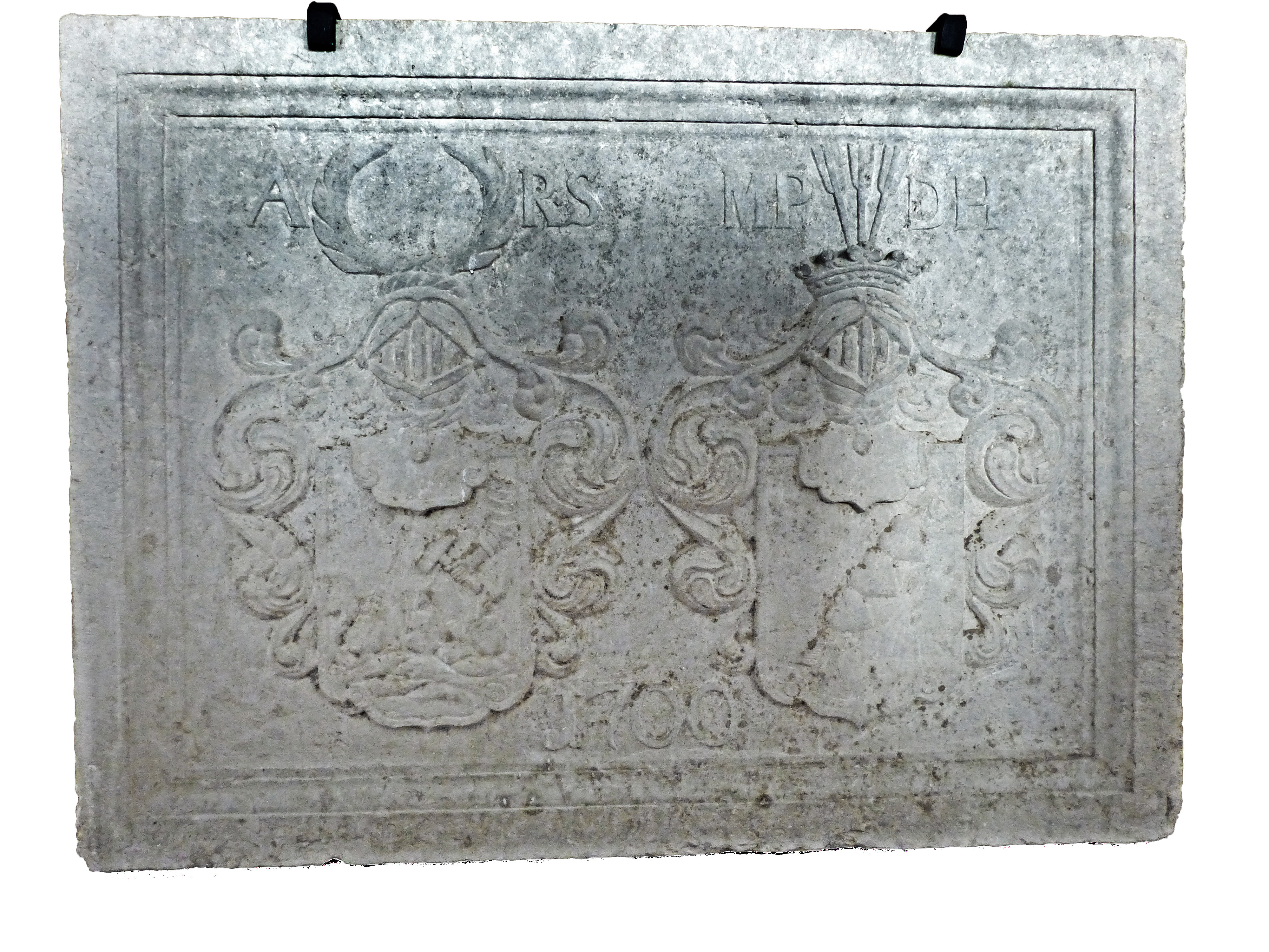 Stentavla som funnits i Reenstiernska släktens gravkor i gamla Skarstads kyrka. Nu uppsatt i nuvarande Skarstads kyrka. Visar initialer från Abraham Reenstierna och hans hustru Mette Hierna. Med de båda ätternas vapen.